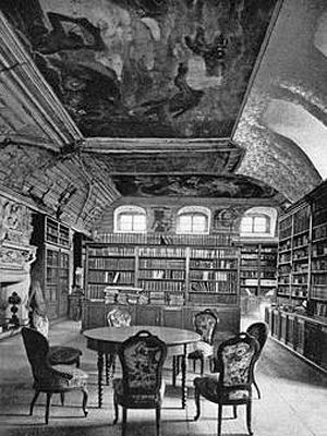 Die Bibliothek im Schloss Rötha um 1940